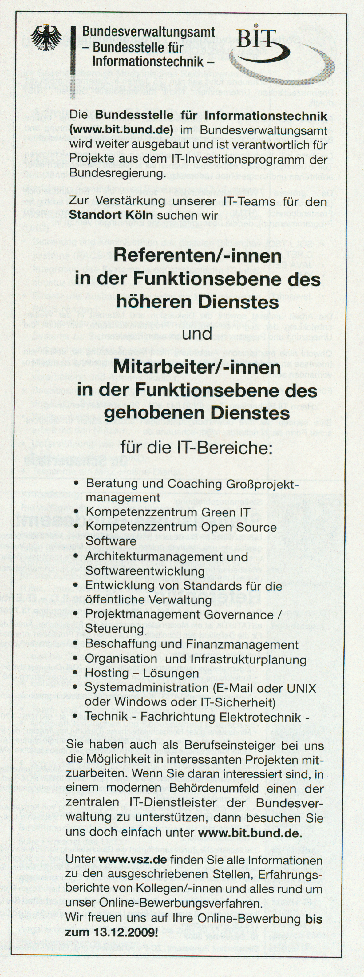 Stellenanzeige vom Bundesverwaltungsamt